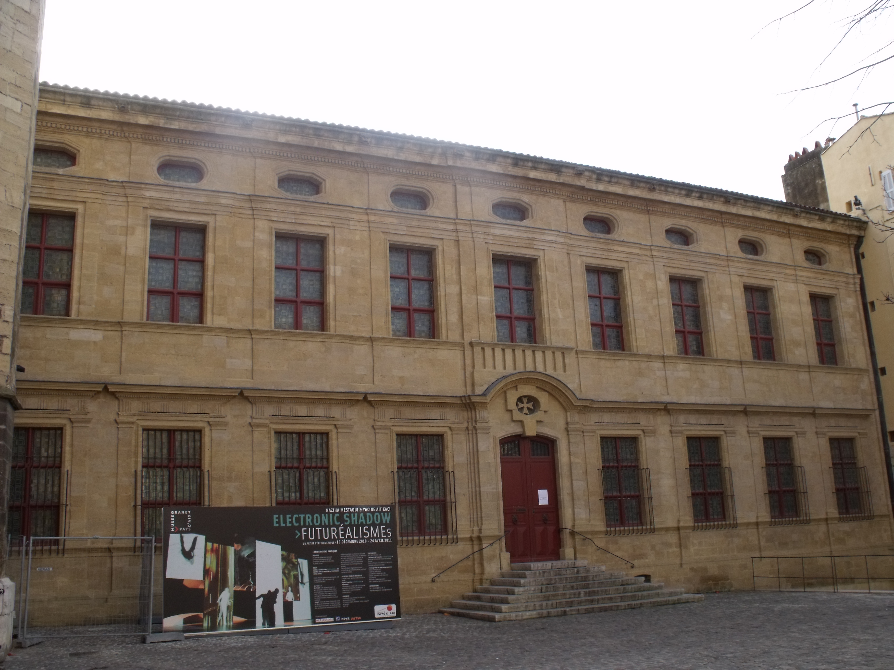 Façade du musée Granet. Aix-en-Provence.